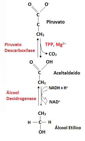 Esquema representando os diferentes passos que ocorrem na fermentação alcoólica.